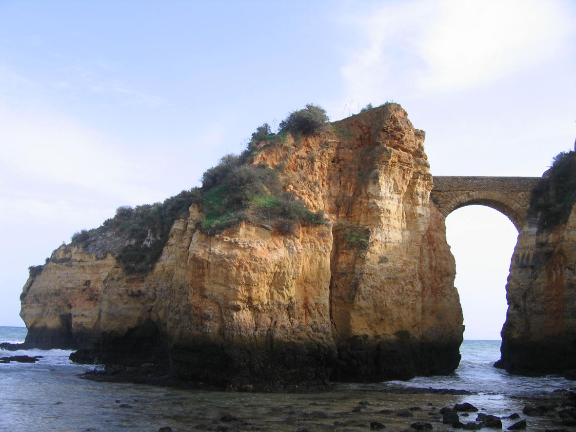 Falaises et pont à Lagos, Algarve, Portugal